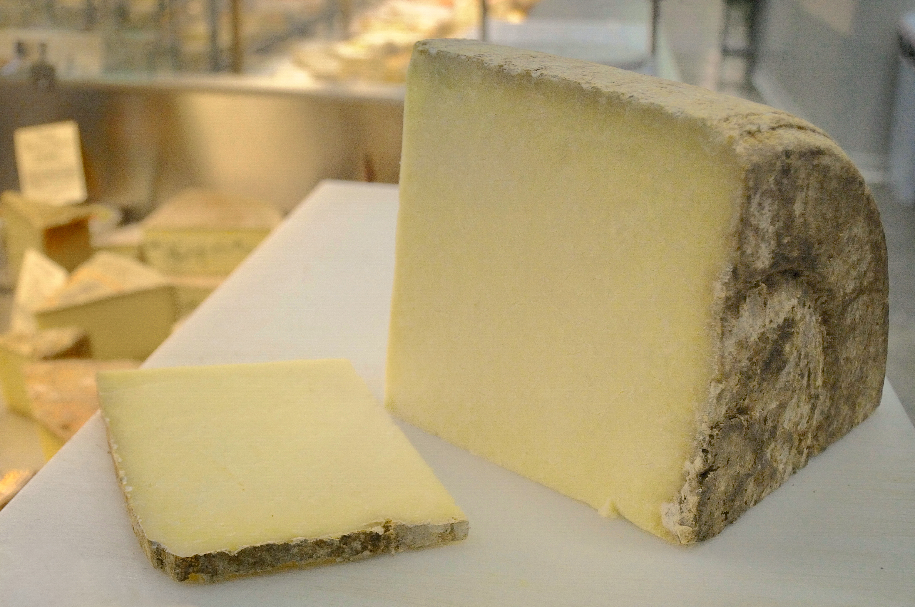 Morceau de fourme de laguiole sur un étal